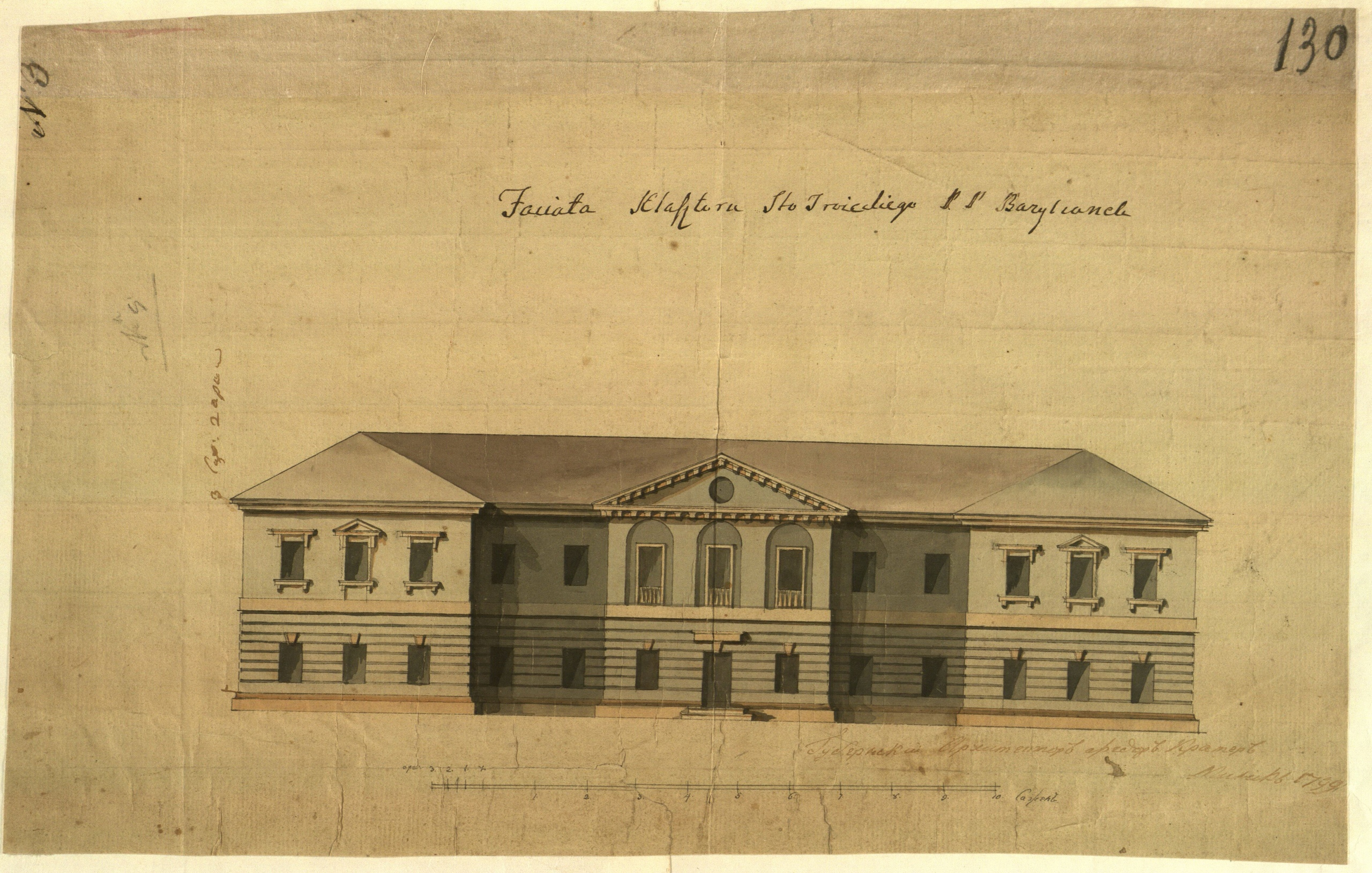 Беларуская (тарашкевіца): Менск (Miensk), Траецкая гара (Trajeckaja hara). Траецкі манастыр базылянак